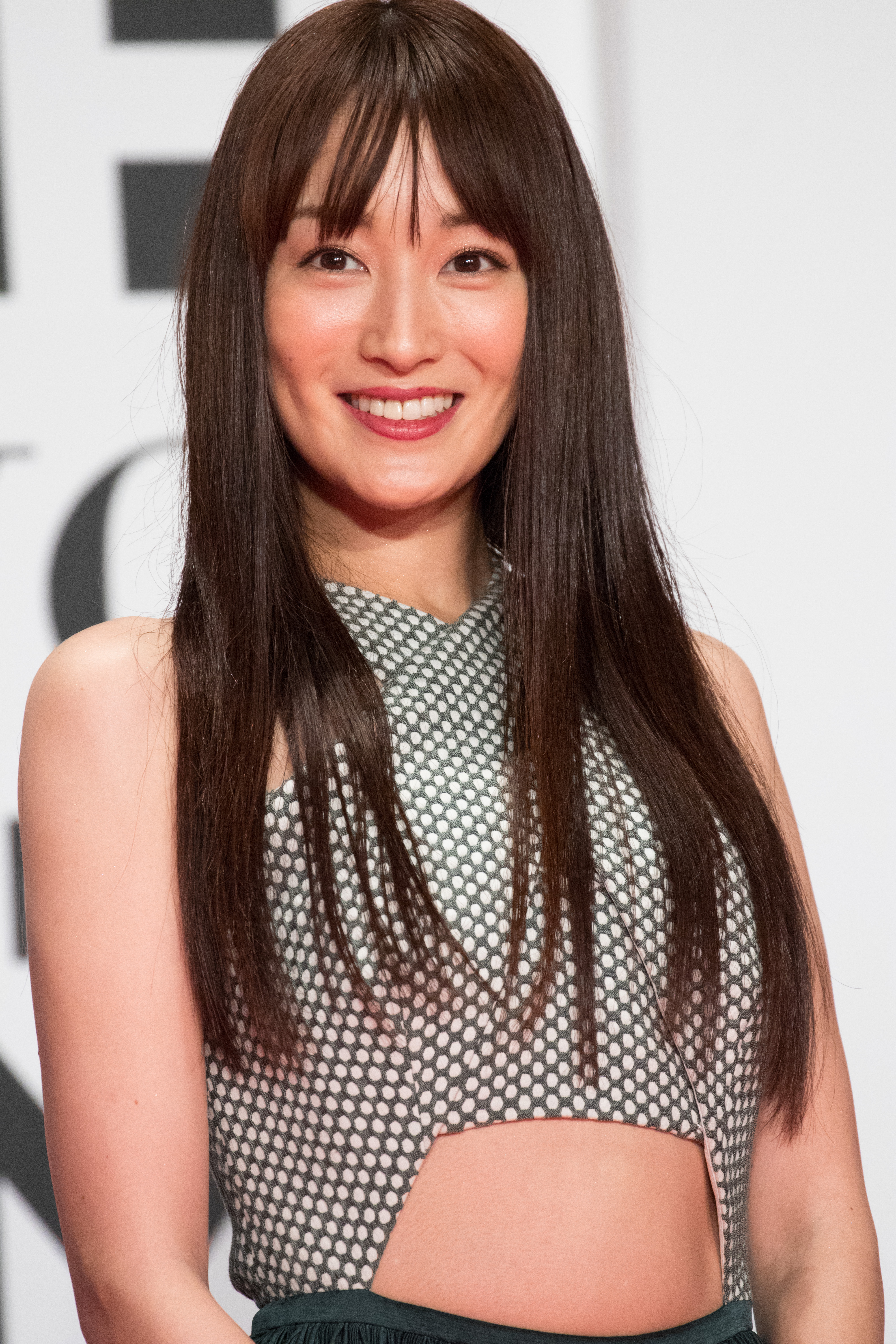 第29回 東京国際映画祭 オープニングセレモニー 高梨臨 (種まく旅人～夢のつぎ木～)